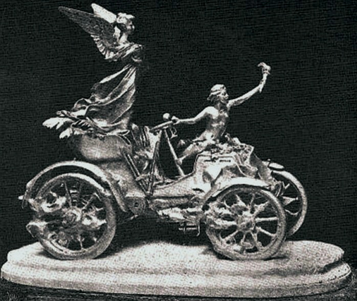 Gordon Bennett Cup (1900-1905 - era paper)